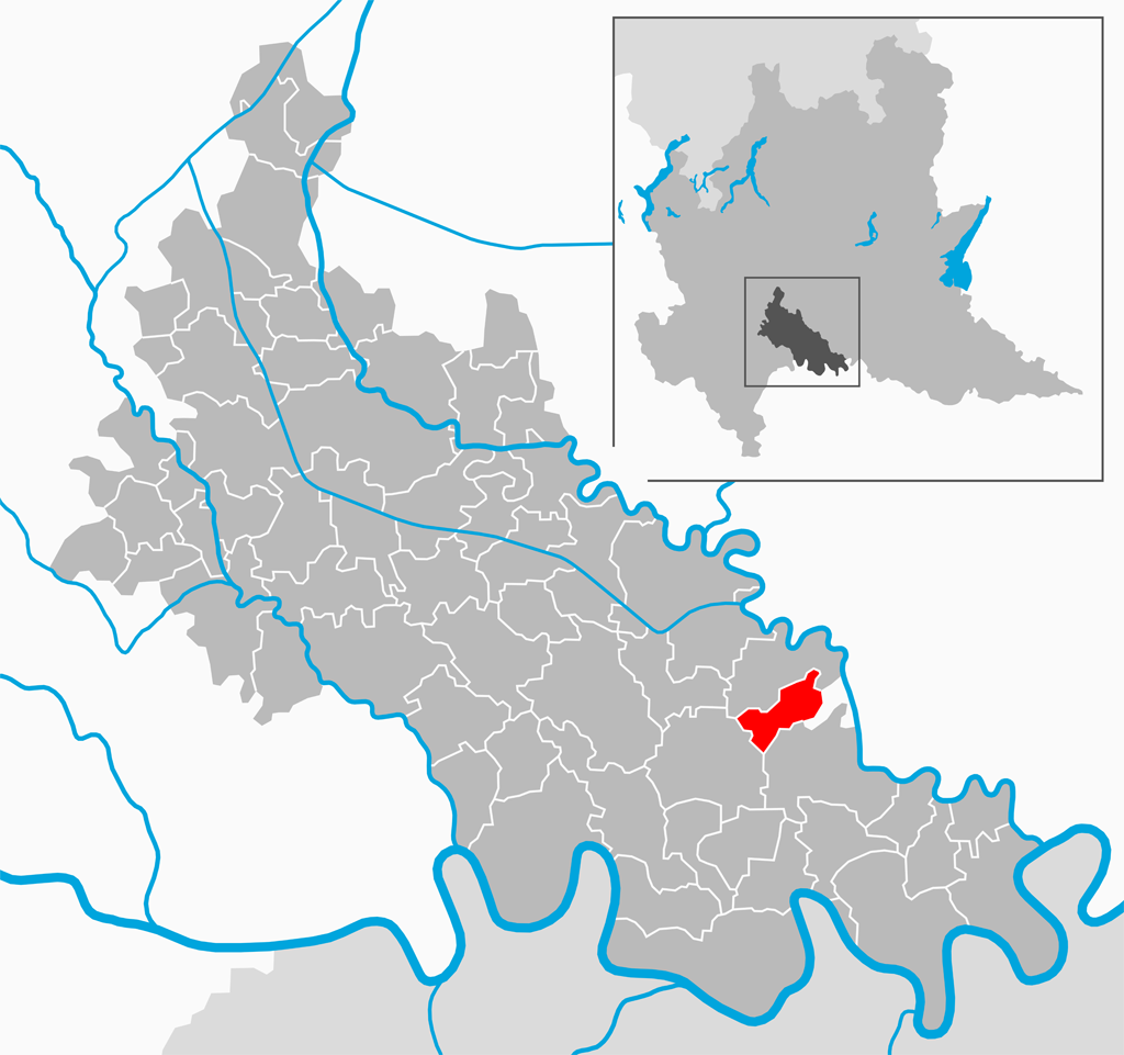 Il comune di Cavacurta nella provincia di Lodi